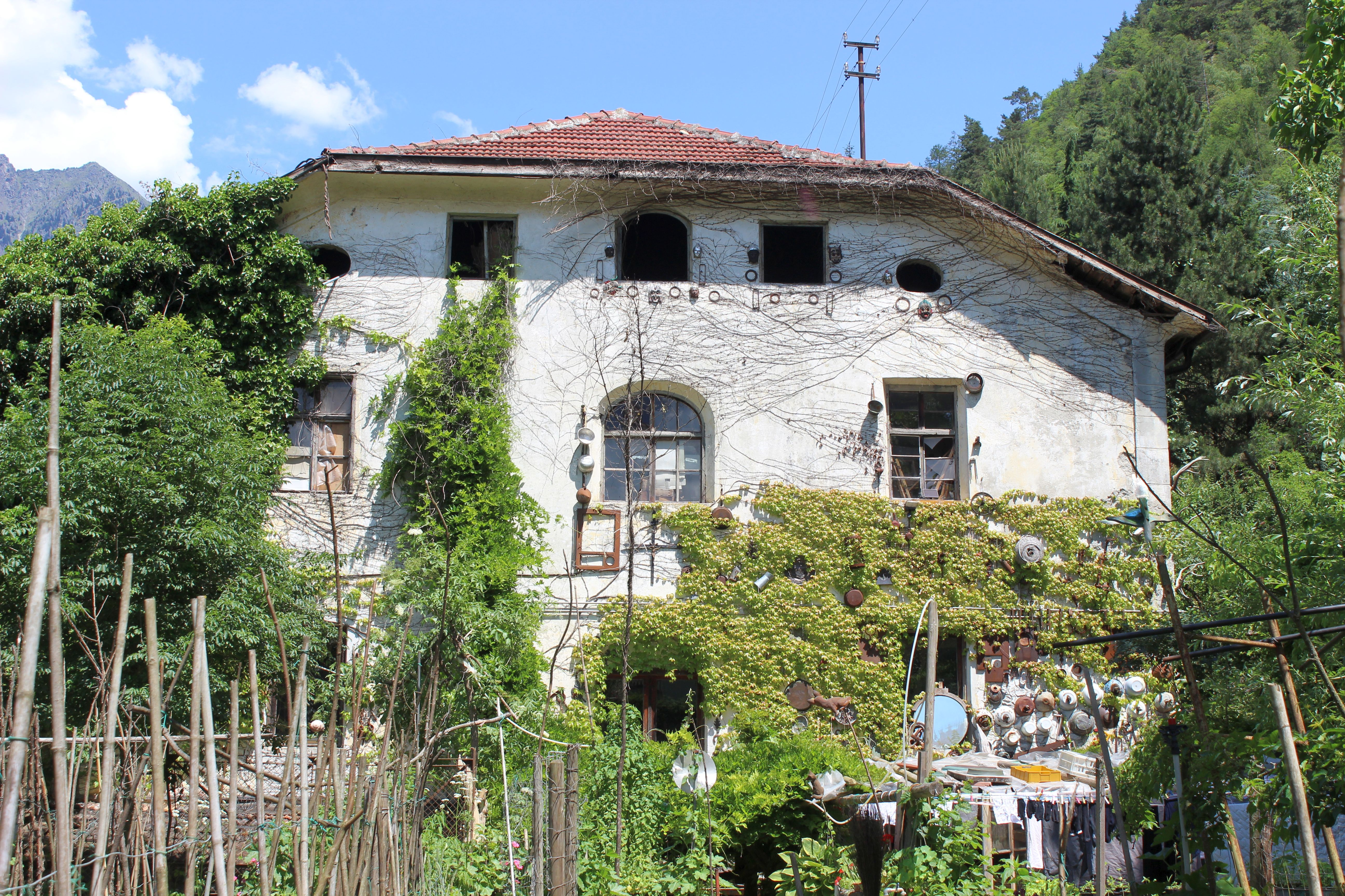 Bad Egart 2015